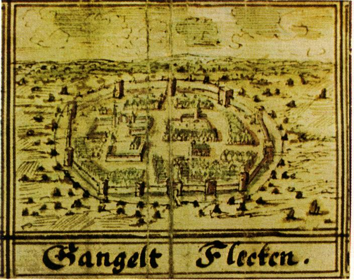 Gangelt